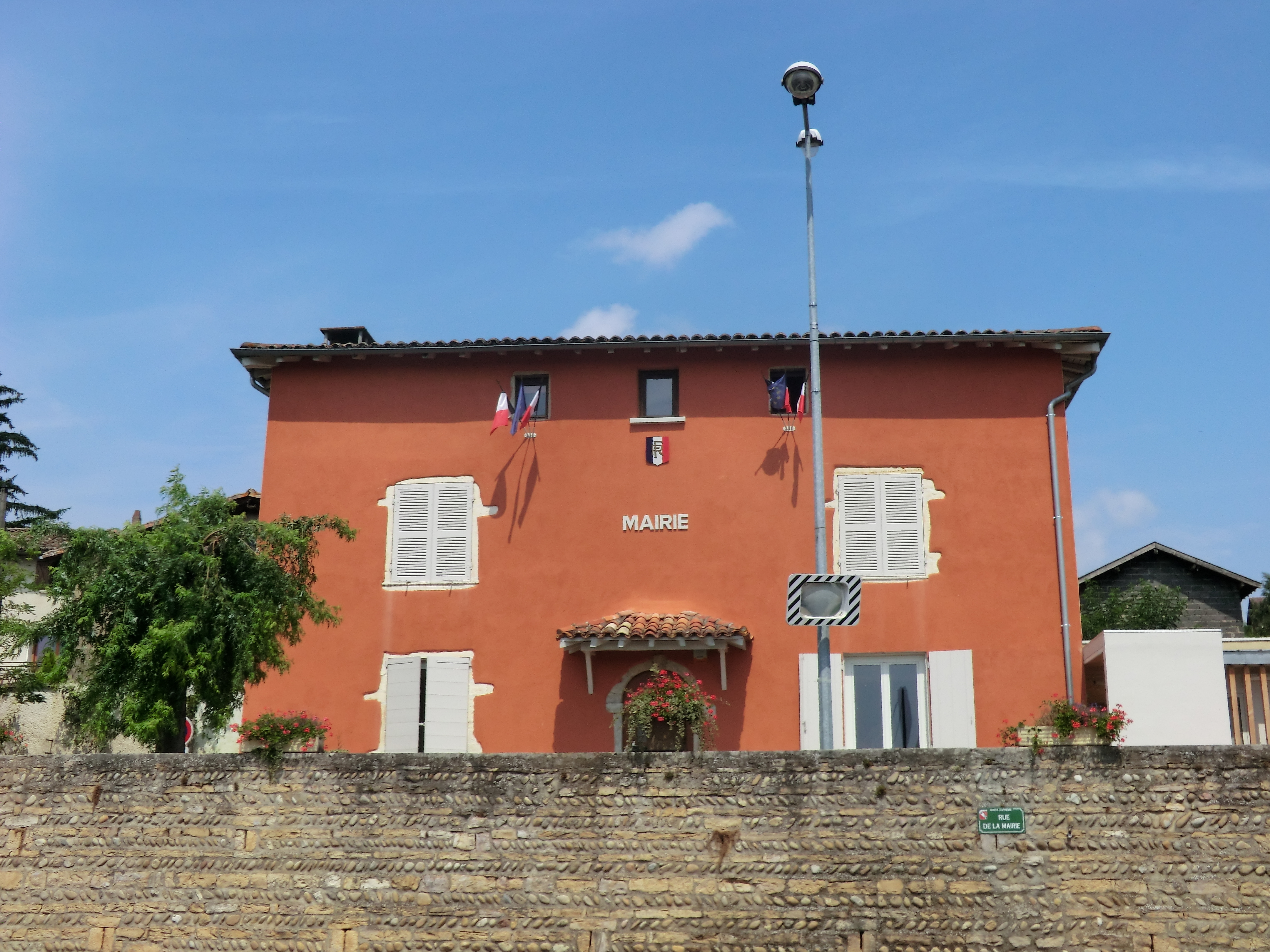 Mairie de Sainte-Euphémie (Ain).